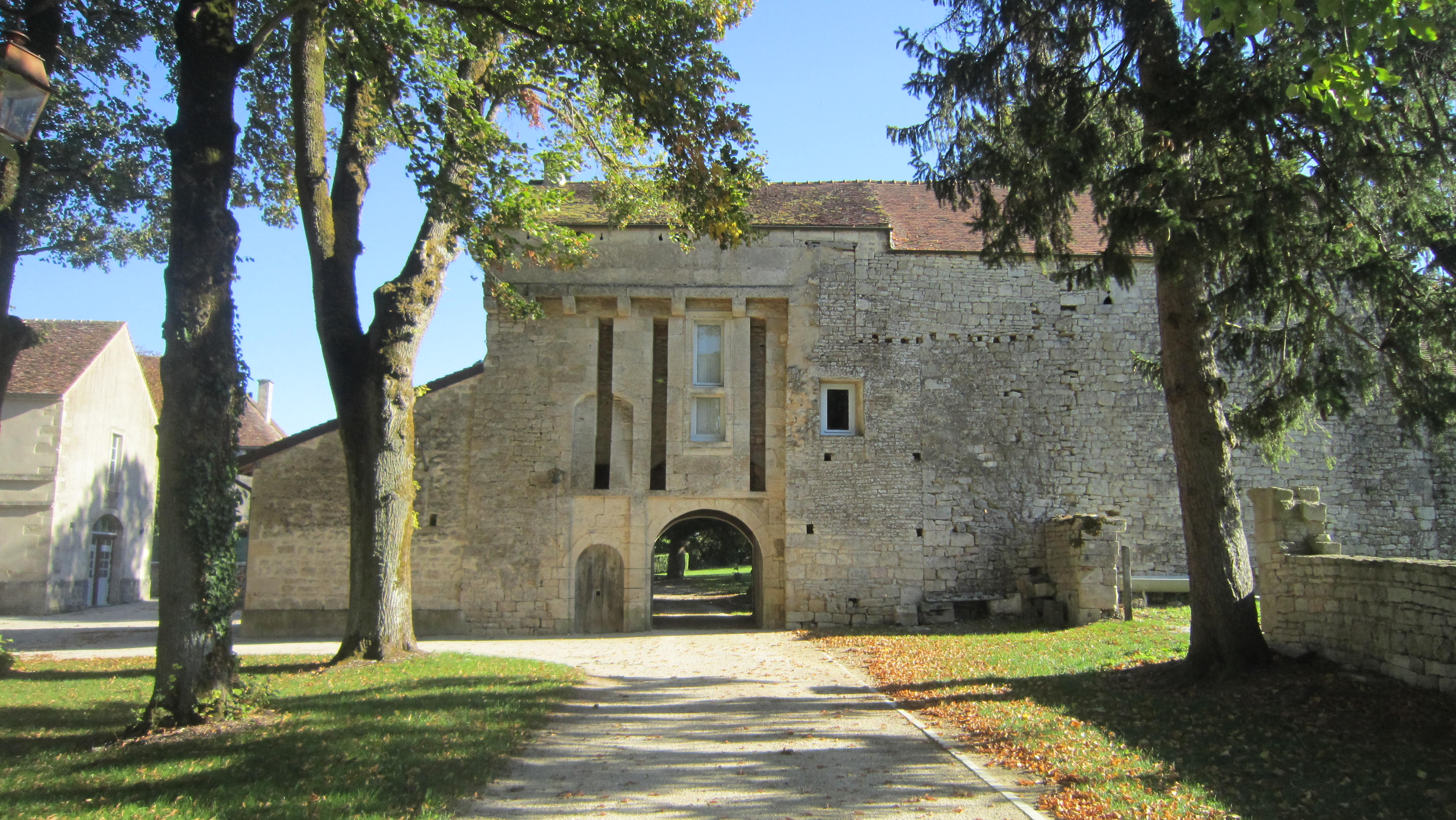 Château de Puits (Côte-d'Or)